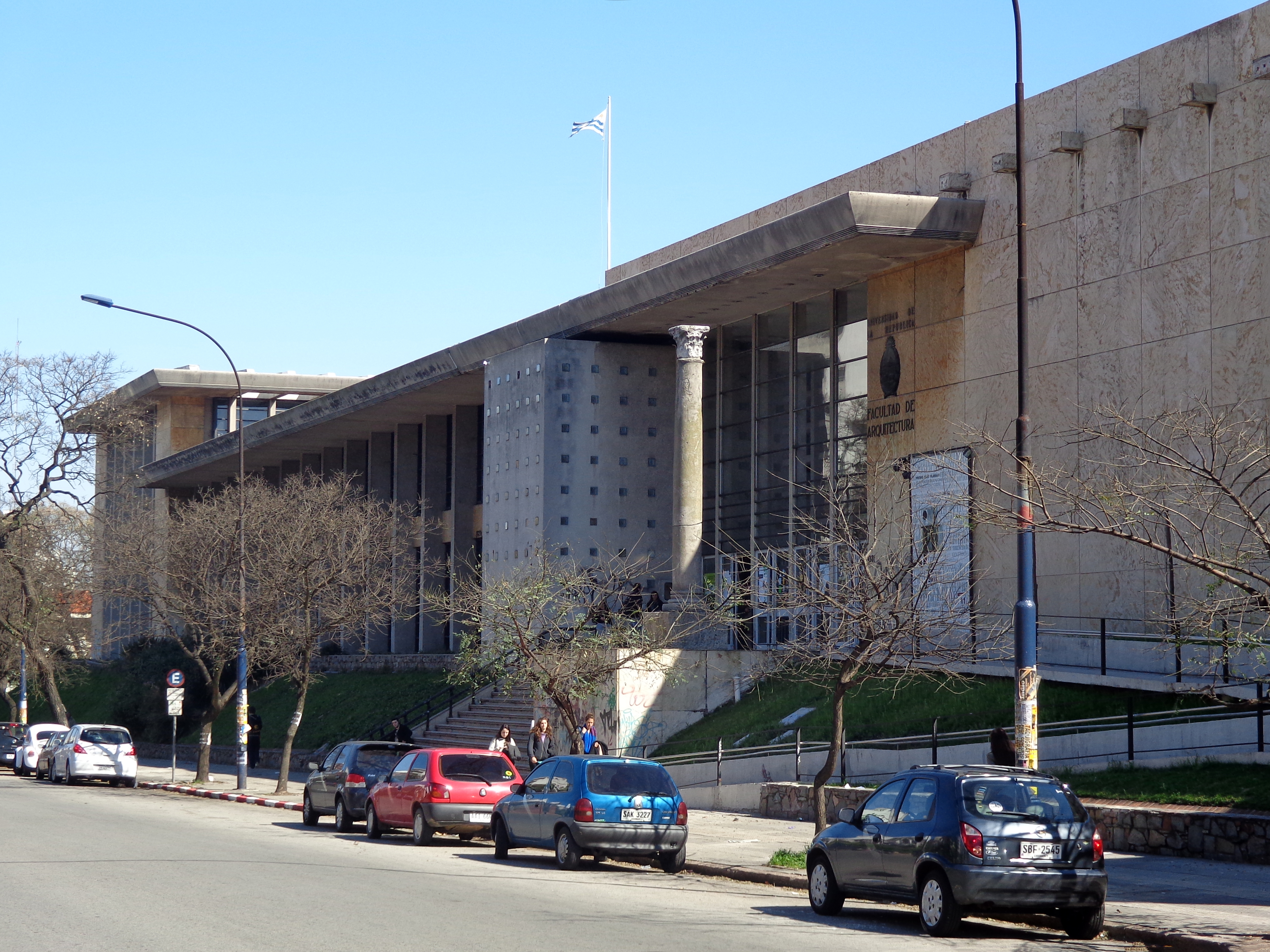 Facultad de Arquitectura. Ubicada en el departamento de Montevideo